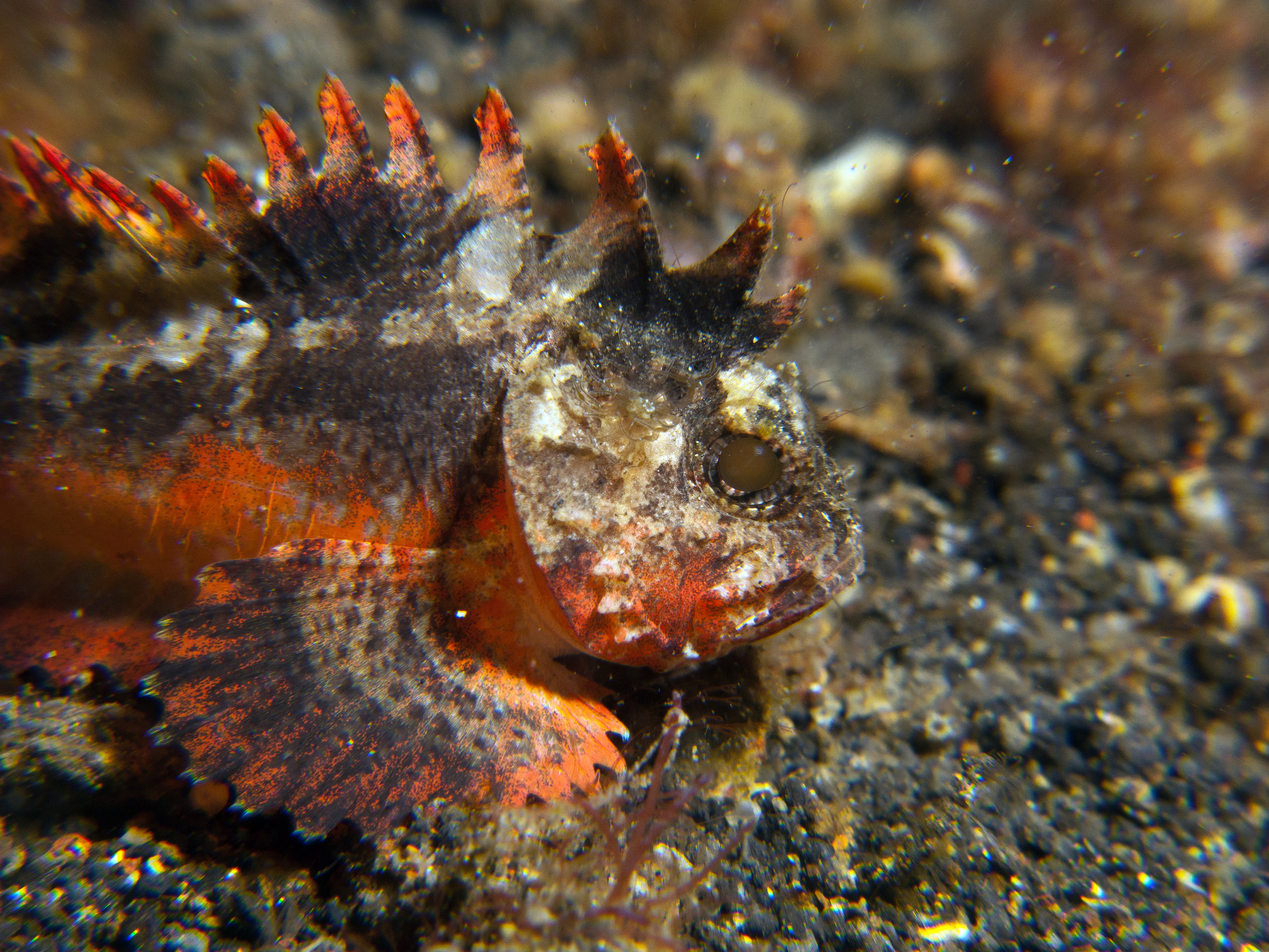 Minous pictus en Bitung, Célebes Septentrional, Indonesia